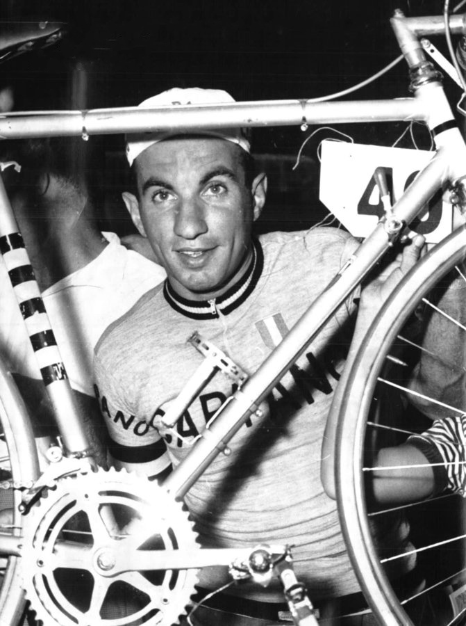 Nino Defilippis